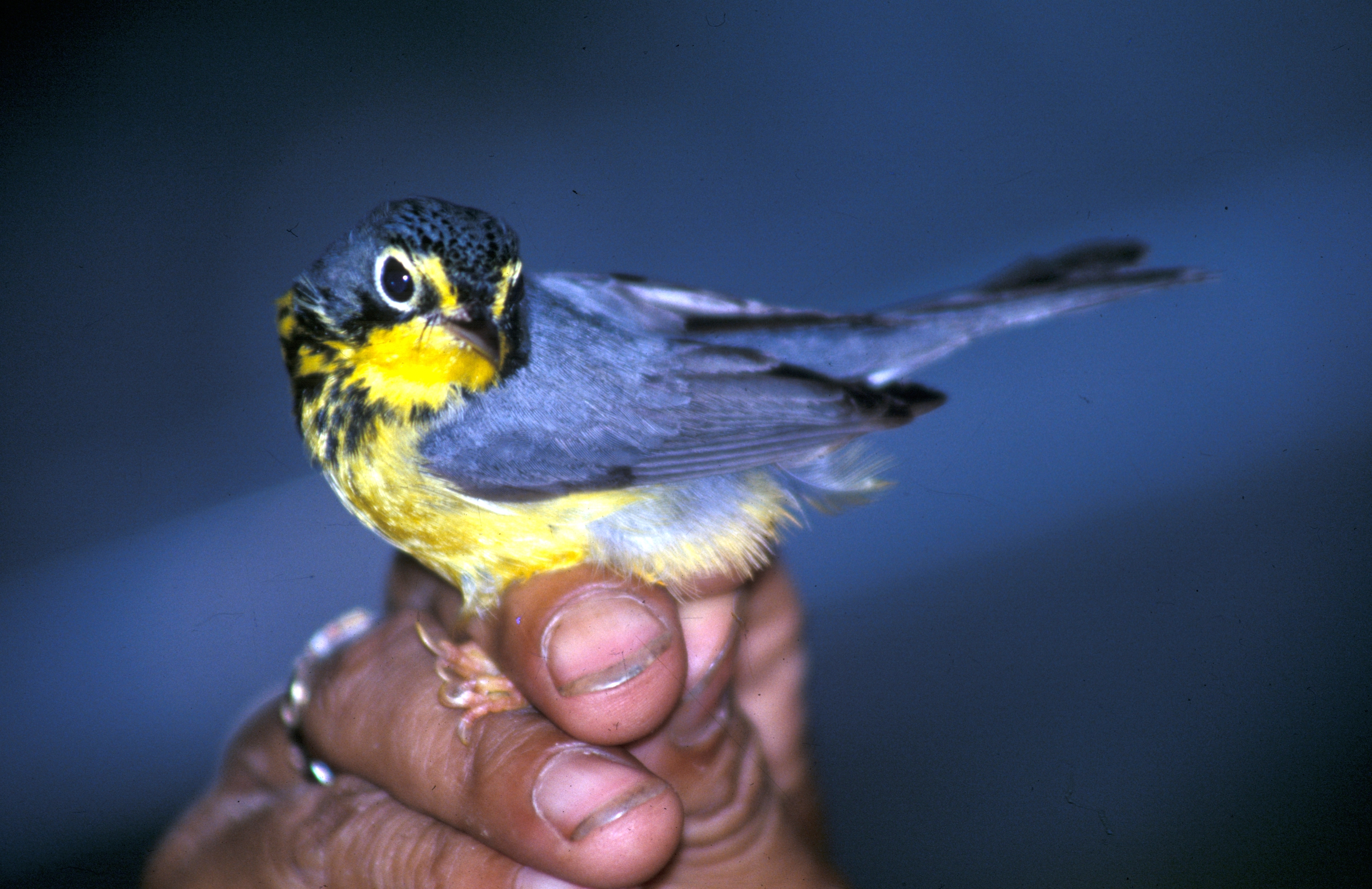 Canada Warbler (Wilsonia canadensis) in Ecuador